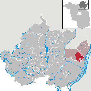 Hohenselchow-Groß_Pinnow in Brandenburg (Country) - District Uckermark